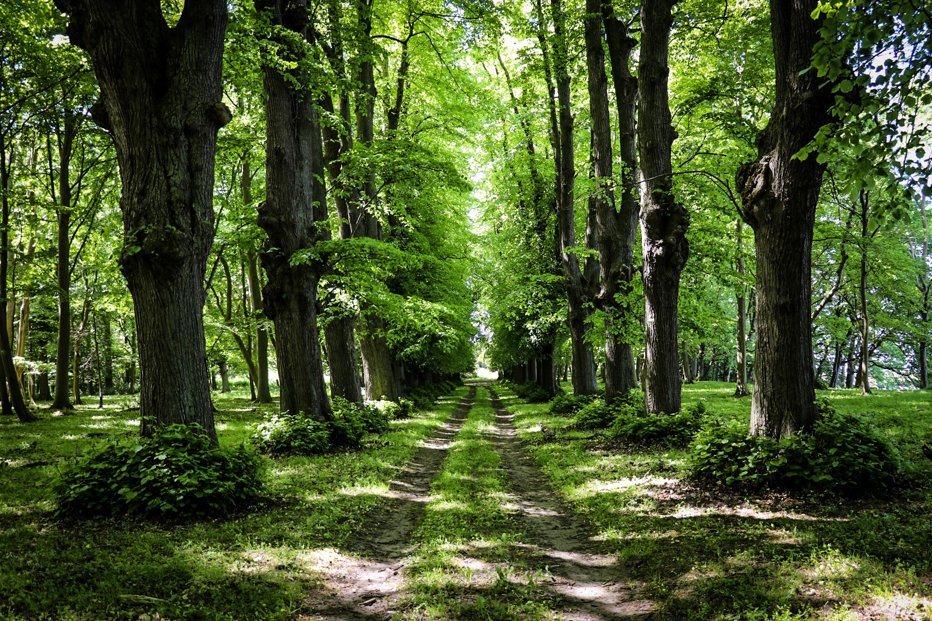 Parkanalage Ralow (2017)